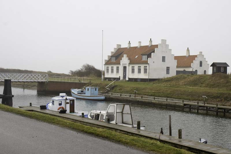 Limfjordsmuseet, danish museum, situated at Frederik VII's canal, Løgstør